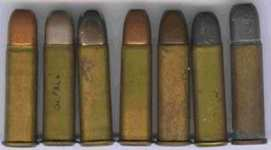 8mm naboji za francoski revolver M.1892.